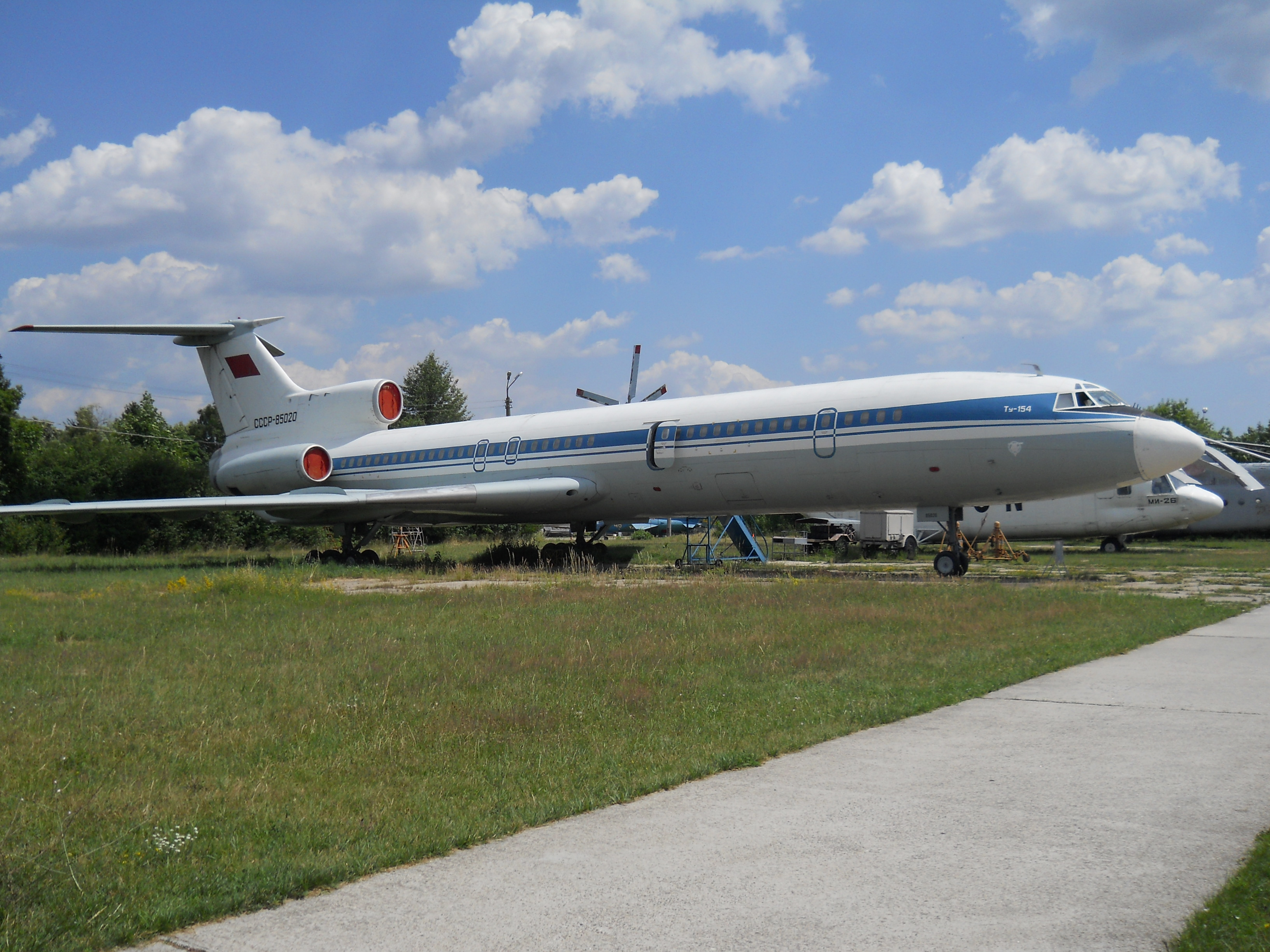 kiev ukraine 1076 state aviation museum zhulyany (25)